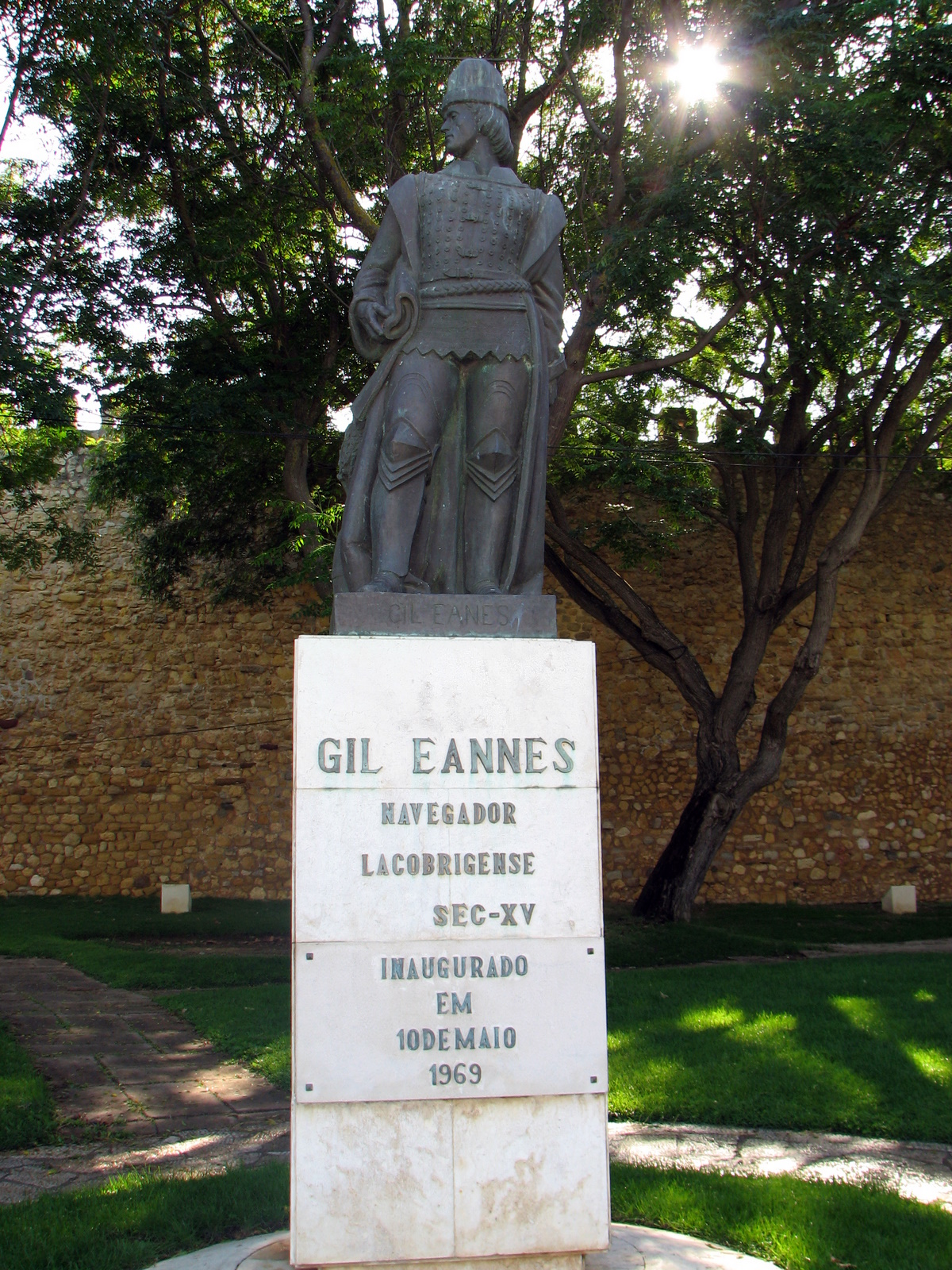 Canto da Maia, Statue of navigator Gil Eanes in Lagos, Portugal